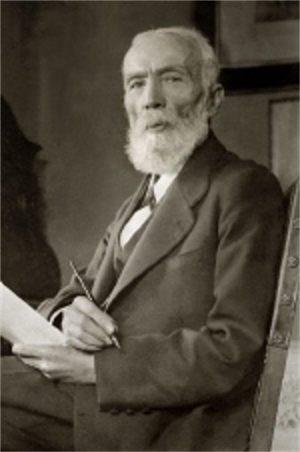 Портрет Івана Пулюя